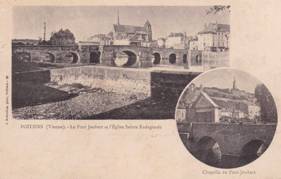 Carte Postale (vers 1900) montrant le Pont-Joubert de Poitiers avant et après la démolition de la chapelle de la Vierge.